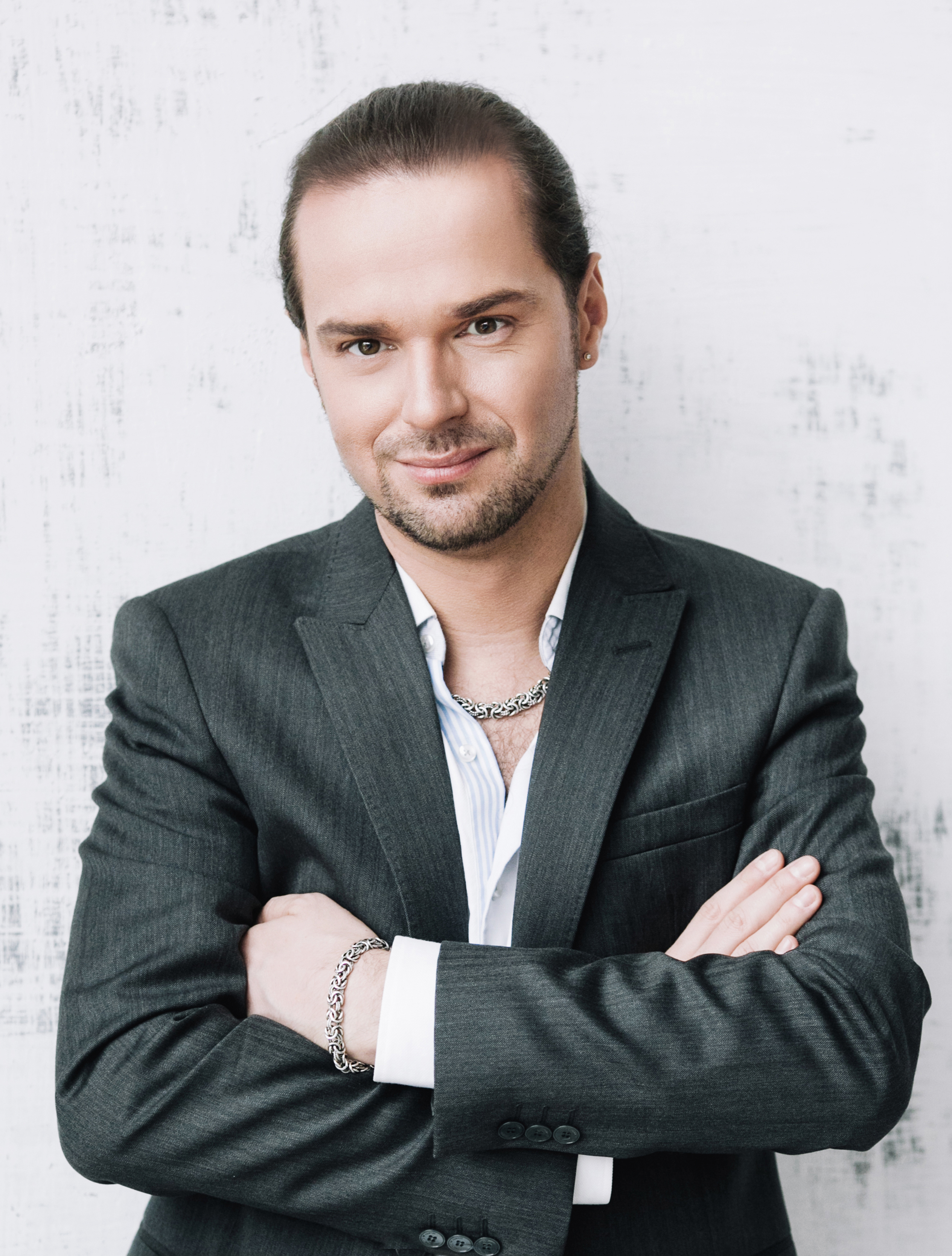 Константин-Костомаров